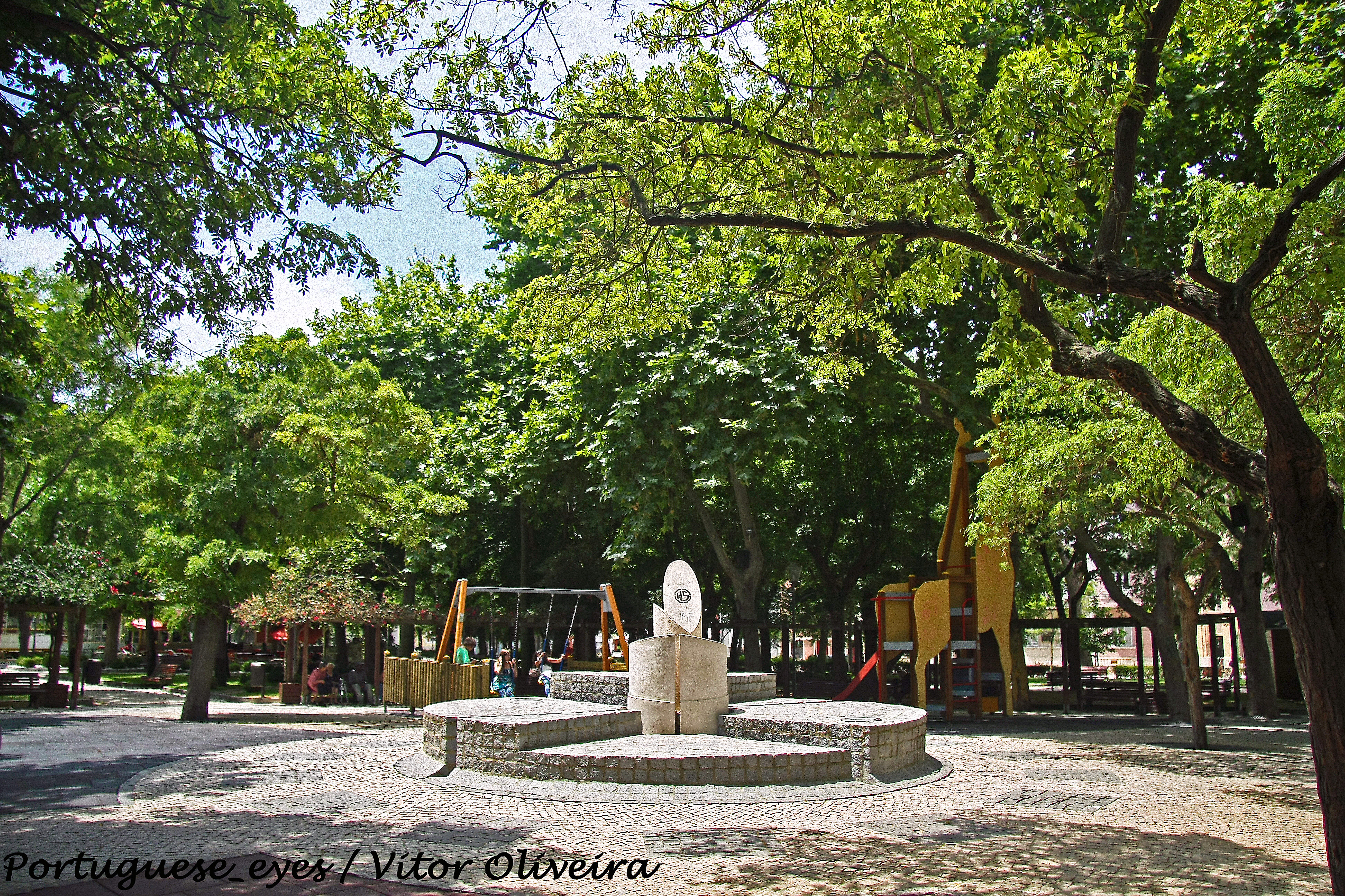 Parque Catarina Eufémia faz o contraste entre os ritmos urbanos e o contacto com a natureza. Destaque para uma pequena ilha e para a estátua de Alfredo da Silva. See where this picture was taken. [?]